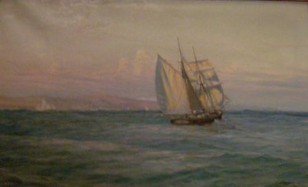 Marina